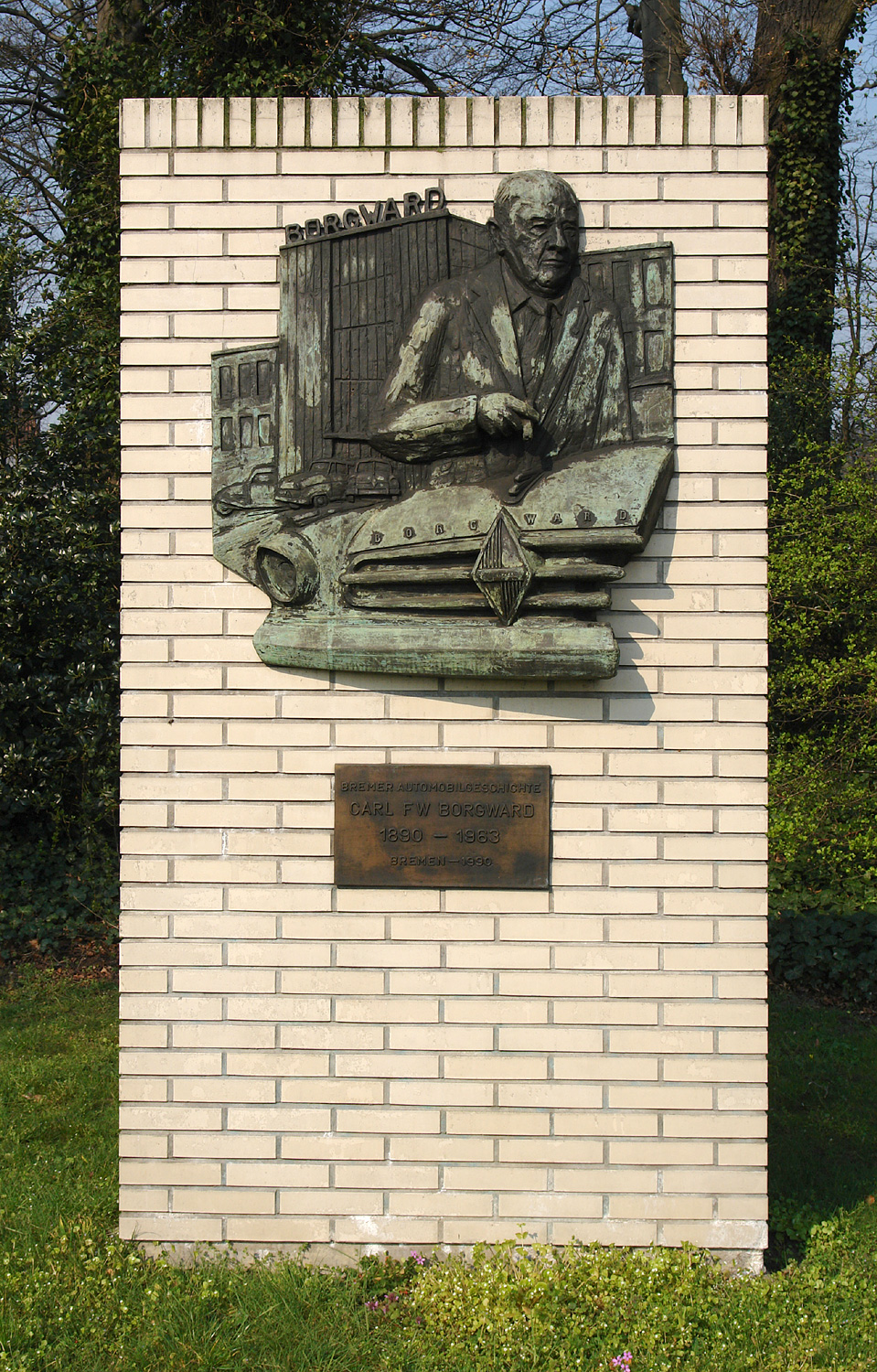 Denkmal für Carl Friedrich Wilhelm Borgward in Bremen an der Mercedesstraße. Inschrift: Bremer Automobilgeschichte Carl FW Borgward 1890 - 1963 Bremen - 1990